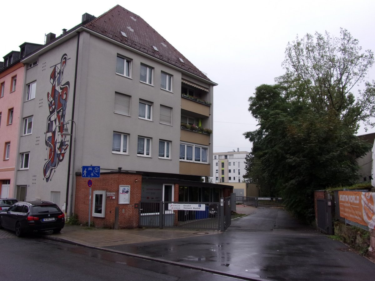 Das Nebenwerk Maxfeld im heutigen Zustand. Das Wandbild zeigt Szenen aus der Arbeitswelt der Straßenbahner.